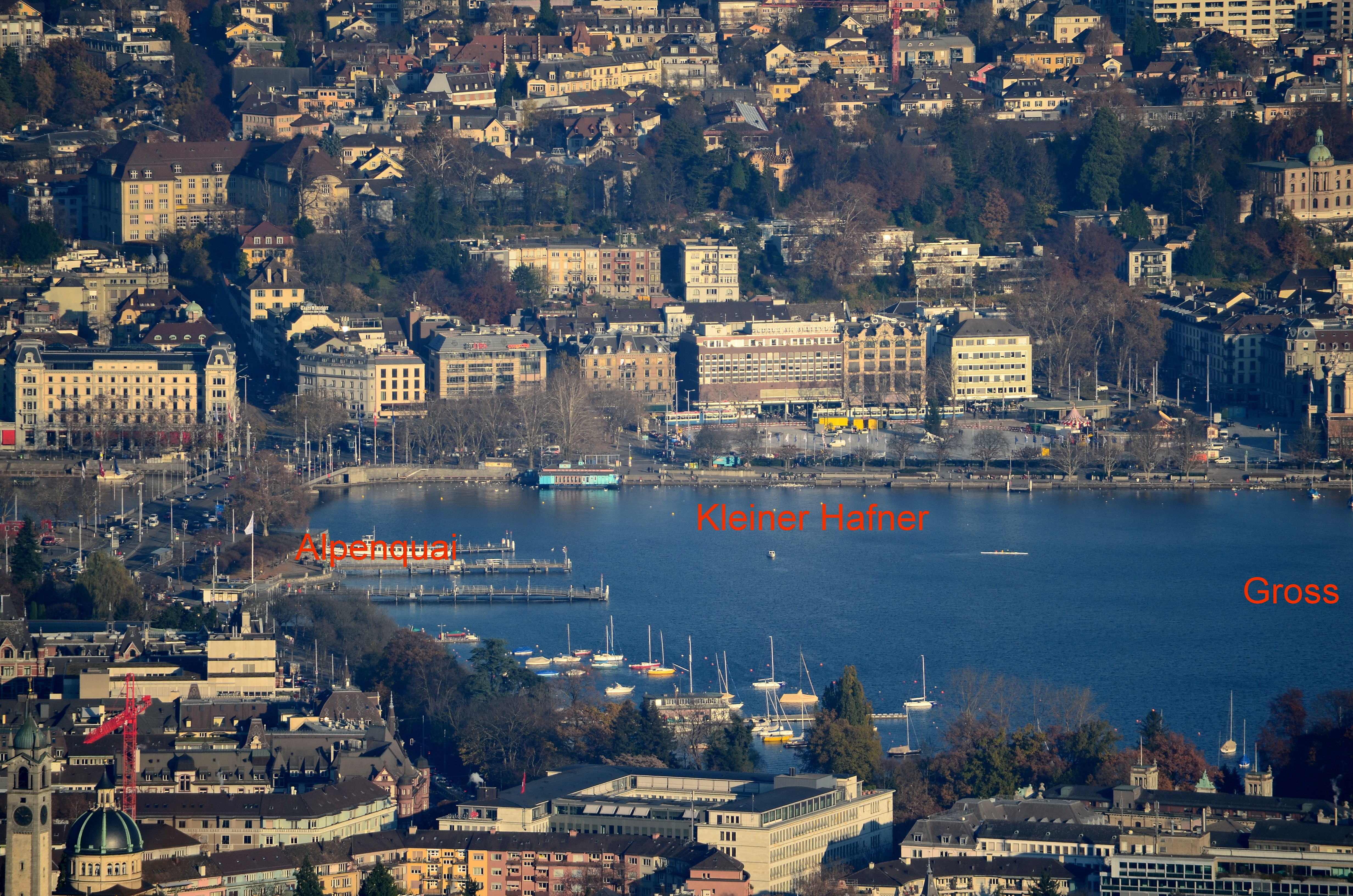 Standort der neolithischen 'Pfahlbausiedlungen' Alpenquai und Kleiner Hafner im unteren Zürichseebecken in Zürich, Ansicht vom Uetliberg